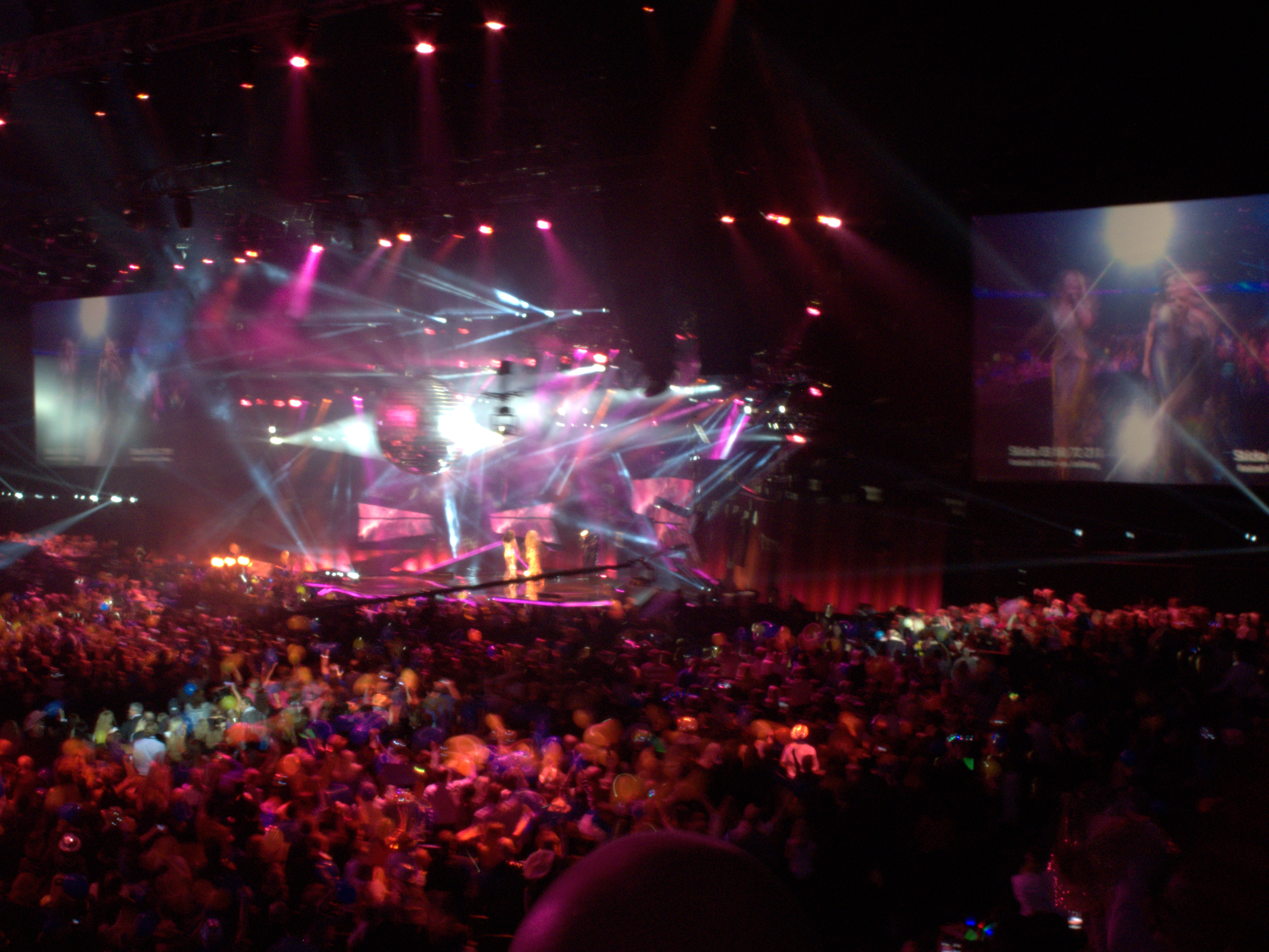 Melodifestivalen 2014 Friends Arena